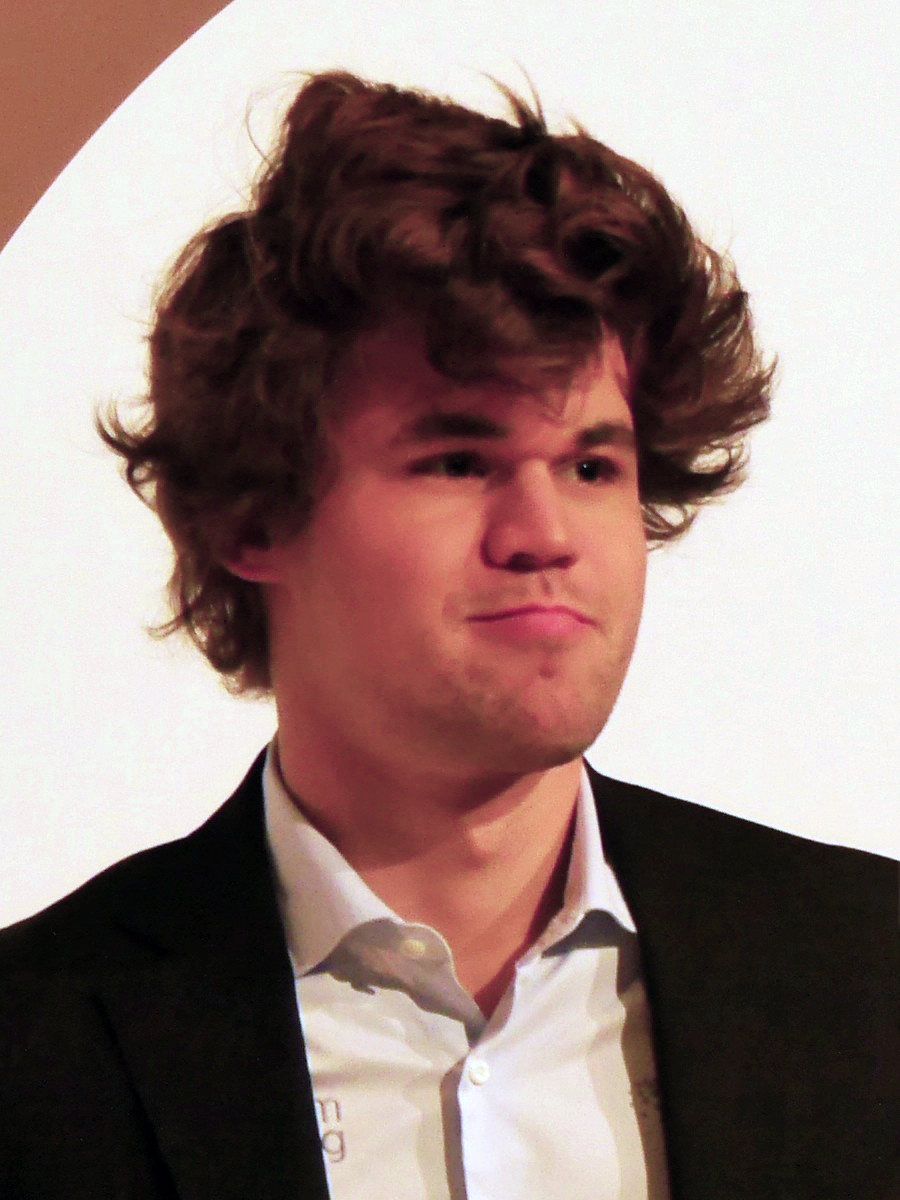 Magnus Carlsen 2017 in Baden-Baden, Grenke Chess Classic.